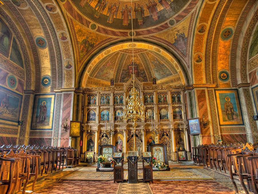 Iconostasul bisericii Sfântul Nicolae din Râşnov– ansamblu